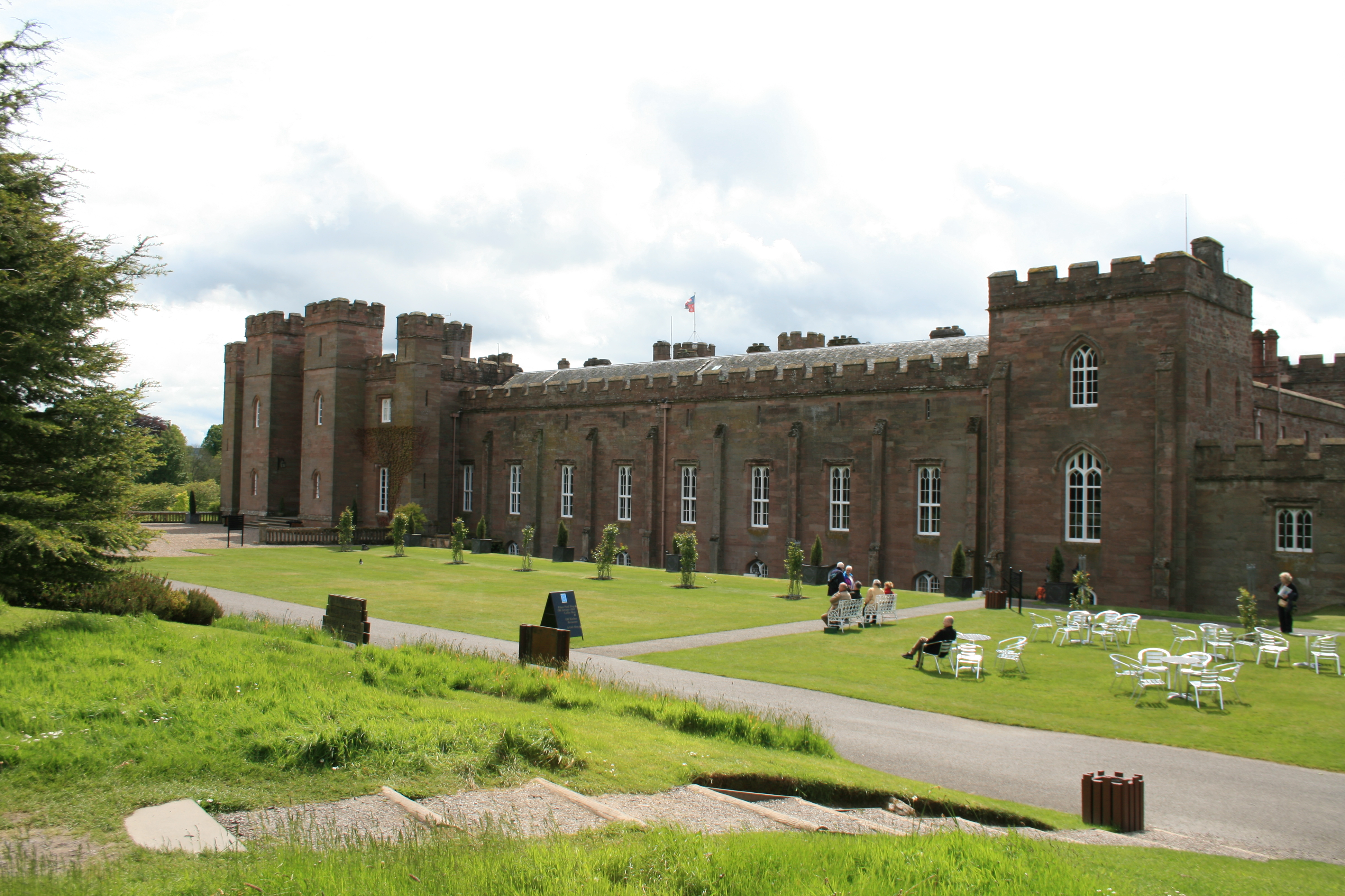 Scone Palace